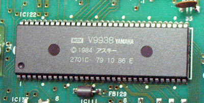 V9938(E-VDP-I,MSX-VIDEO) Ver.C 2005年07月16日 Baz1521撮影